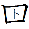 図書館を意味する俗字。投稿者本人による作成。